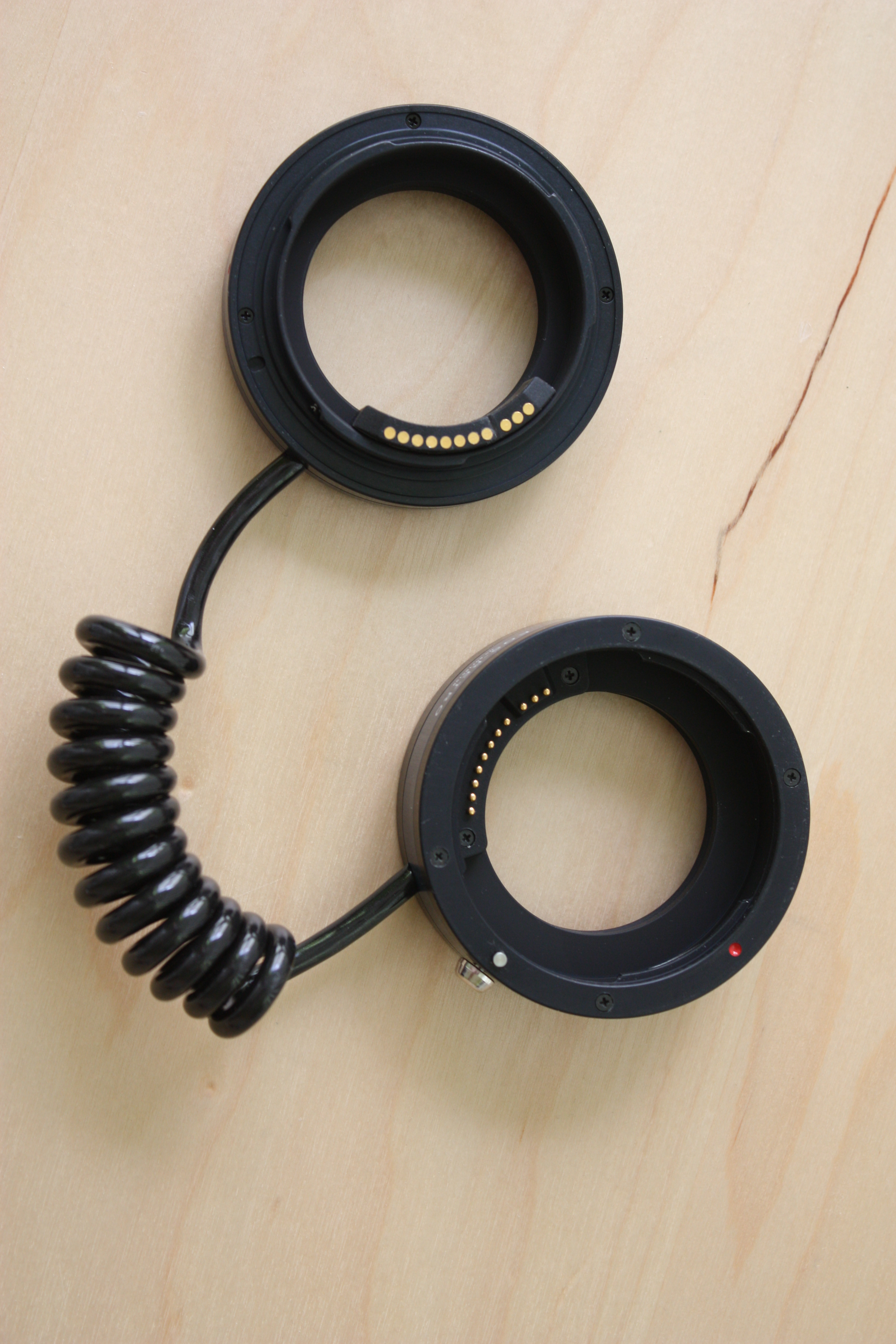 Umkehrring für Spiegelreflexkamera Canon EOS